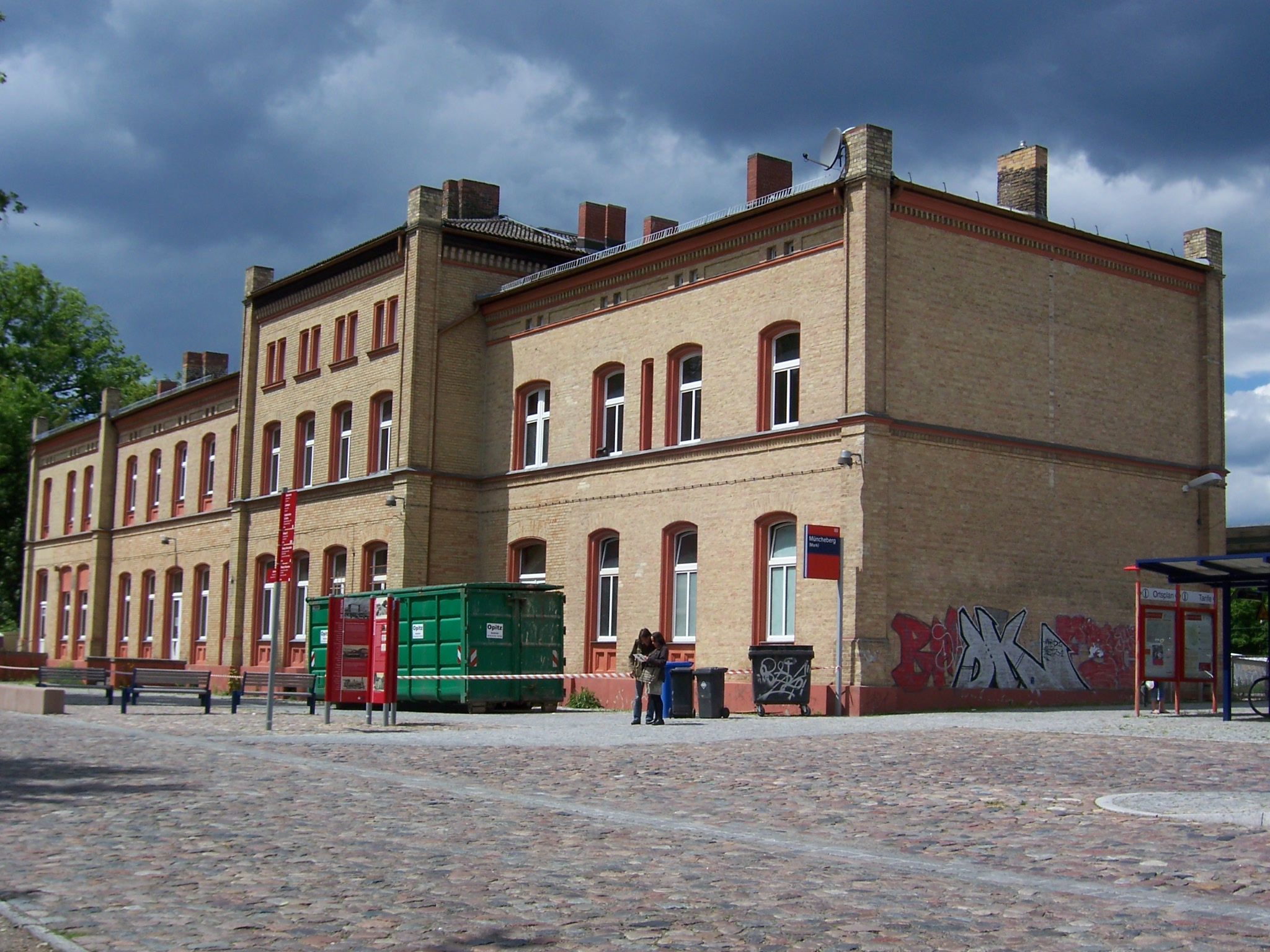 Bahnhof Müncheberg (Mark), Empfangsgebäude Straßenseite